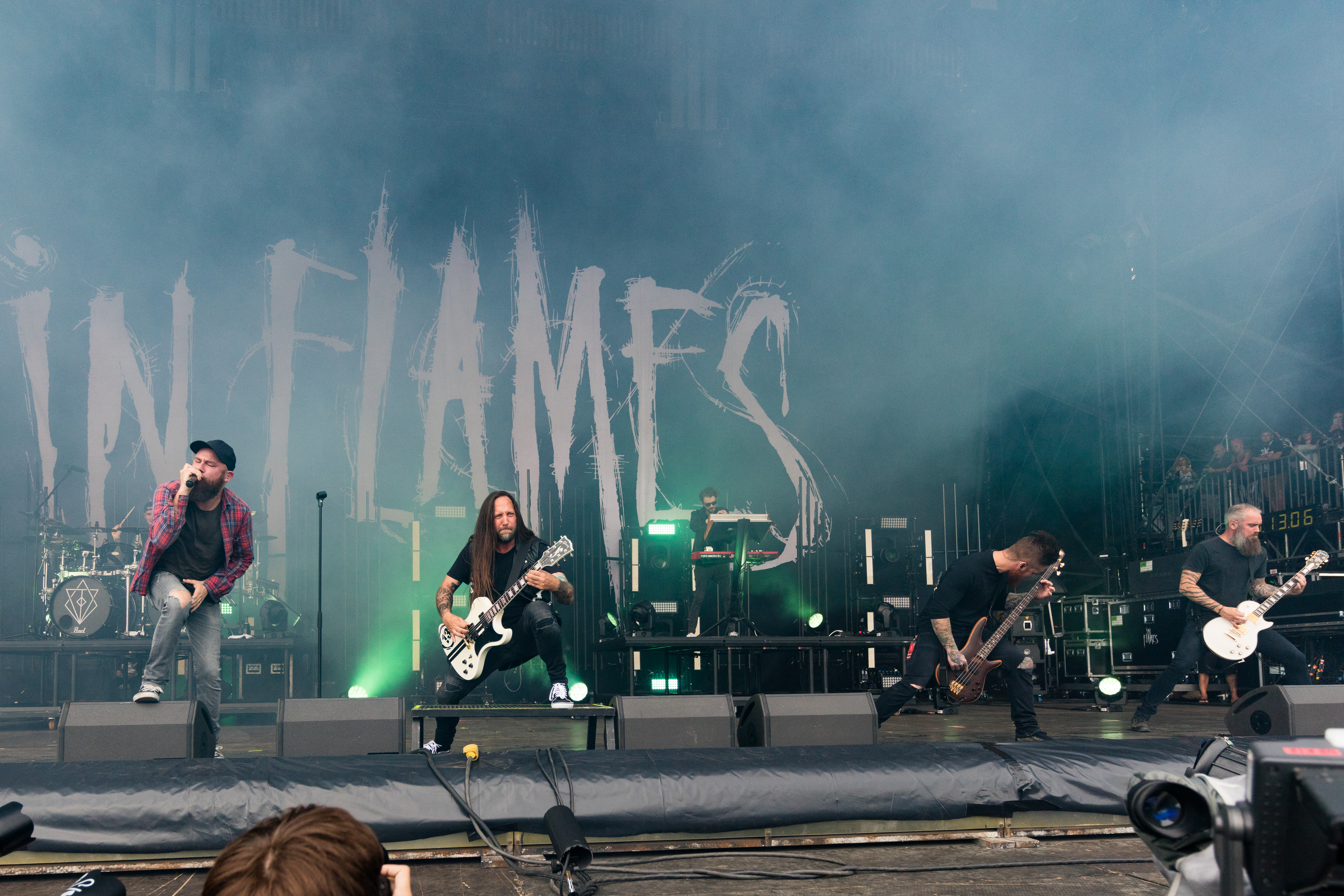 In Flames during Rock am Ring at Nürburgring, Nürnburg, Rheinland Pfalz, Germany on 2017-06-02, Photo: Sven Mandel